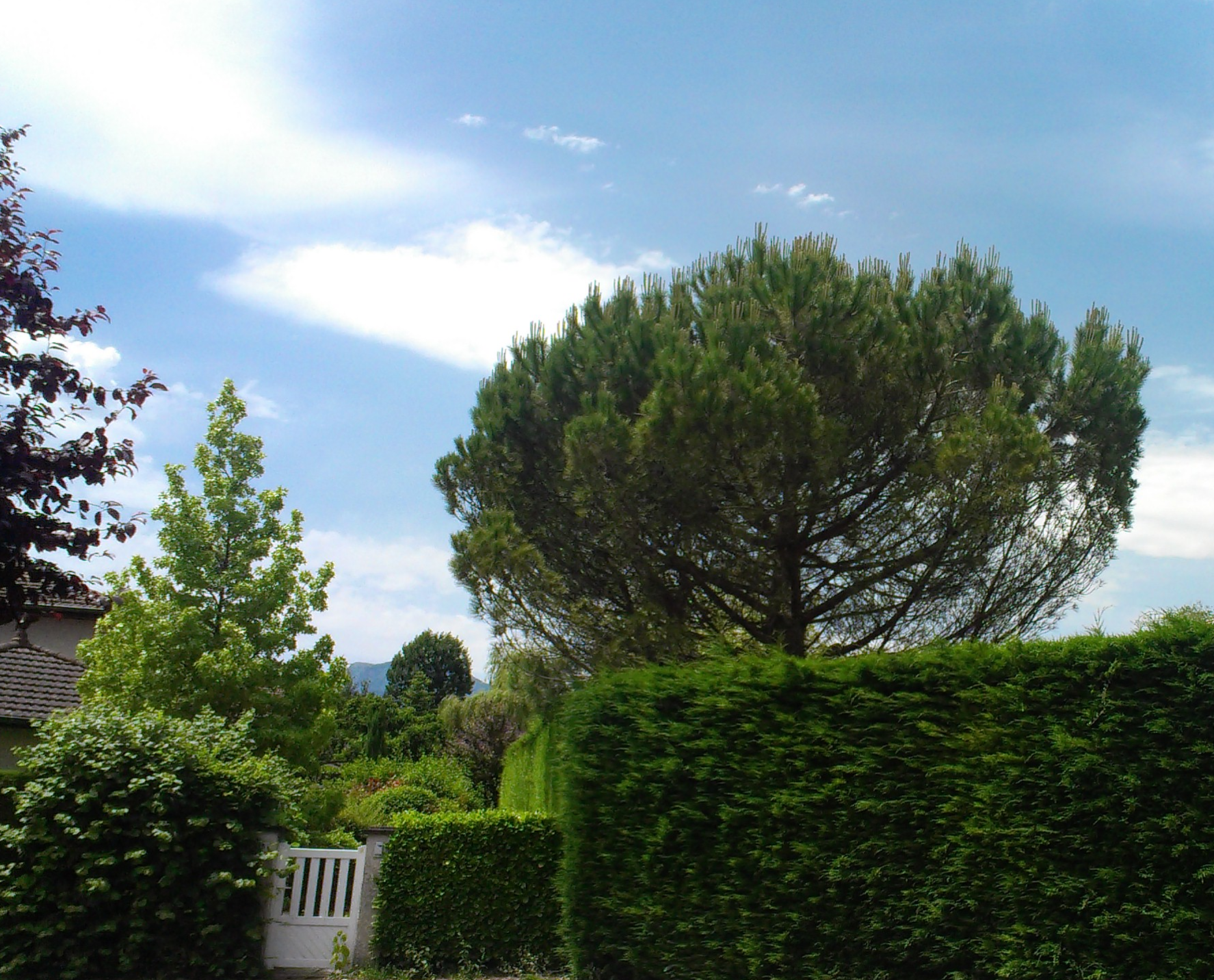 Pin Parasol dans la région de Grenoble, et vent de Foehn dans le ciel sous 37°C (17 juin 2013)